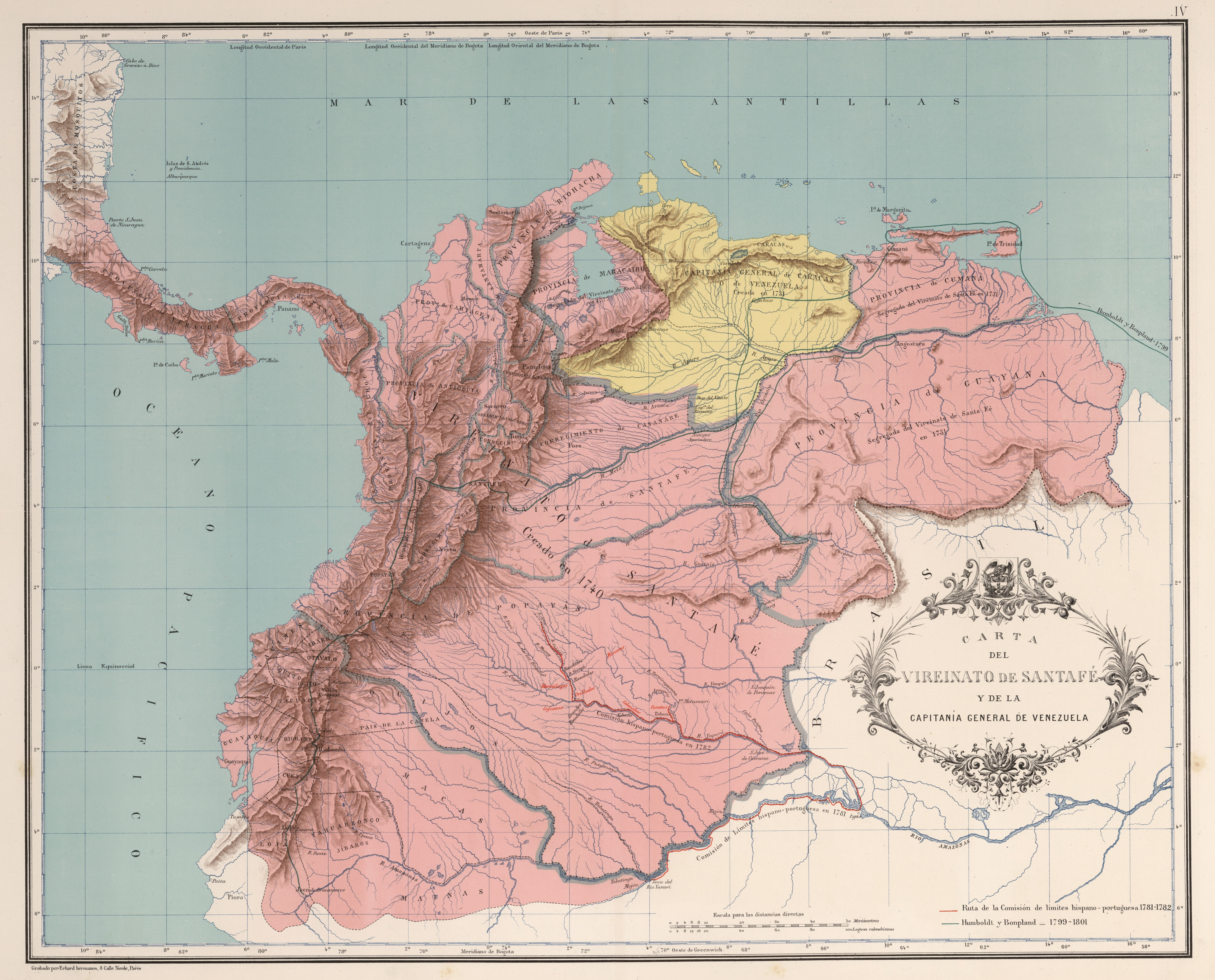 Carta del Virreinato de Santafé y la Capitanía General de Venezuela (1742). Carta IV del Atlas geográfico e histórico de la República de Colombia, 1890.